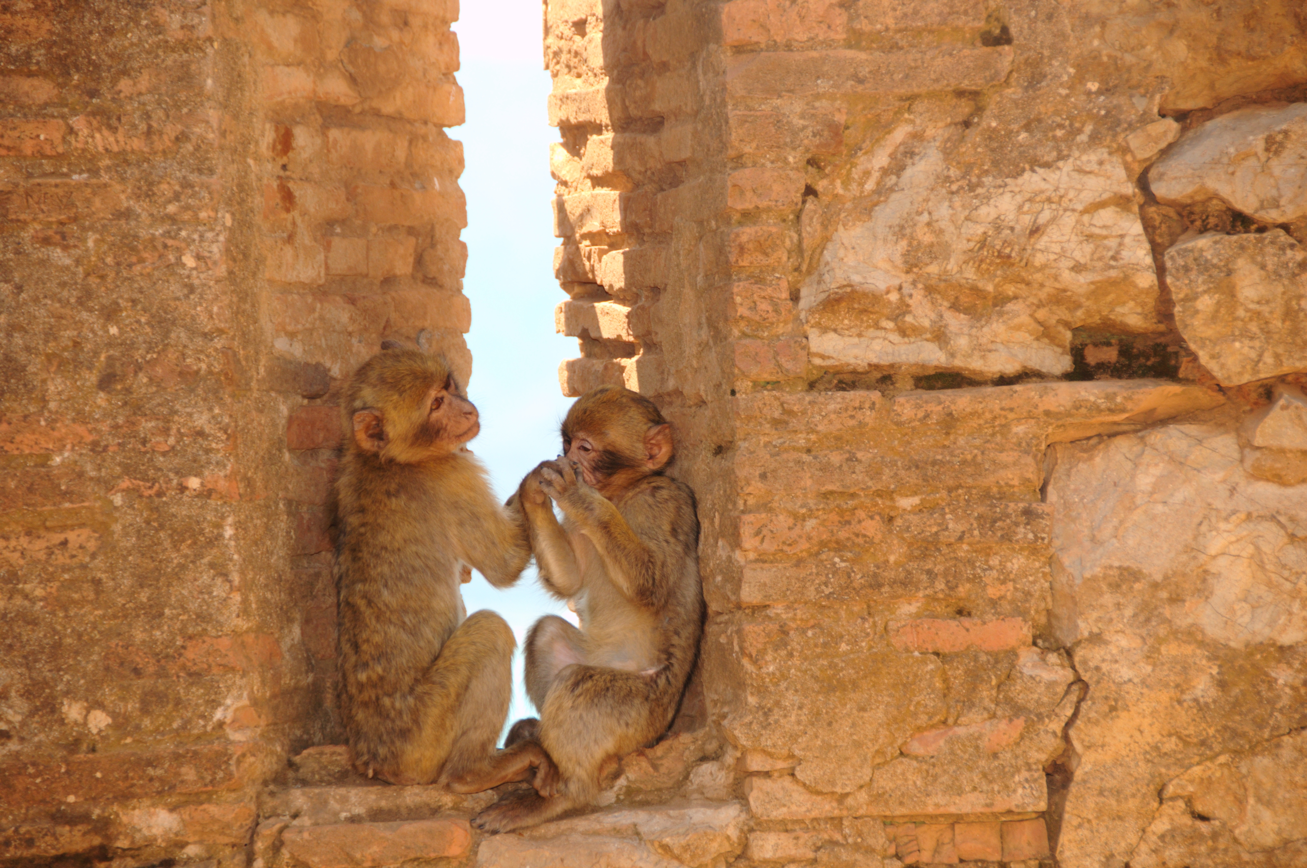 Magot à Yemma Gouraya, Béjaïa